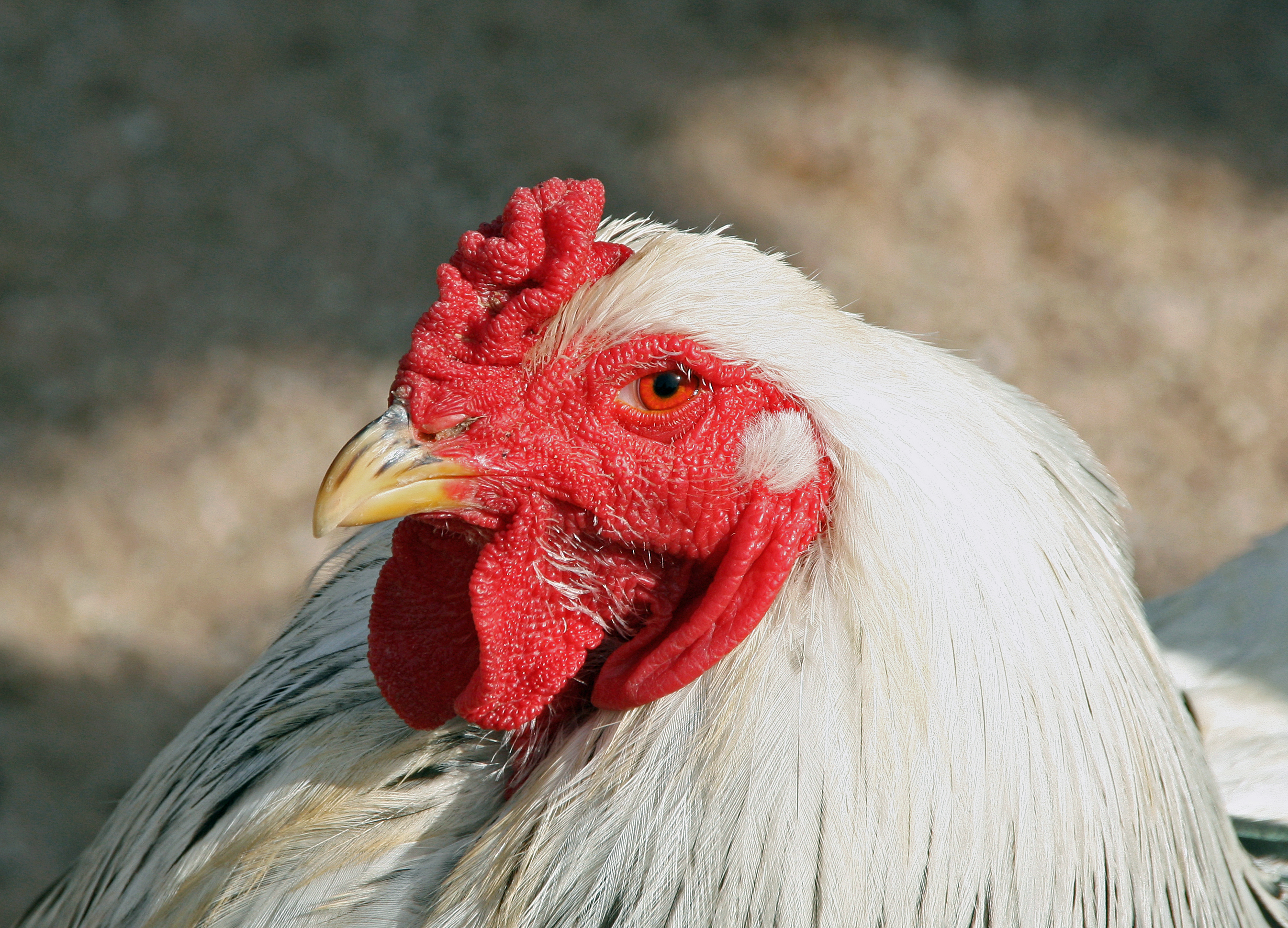 Brahma blanc herminé noir photographié au Parc de Sainte Croix, Rhodes, France